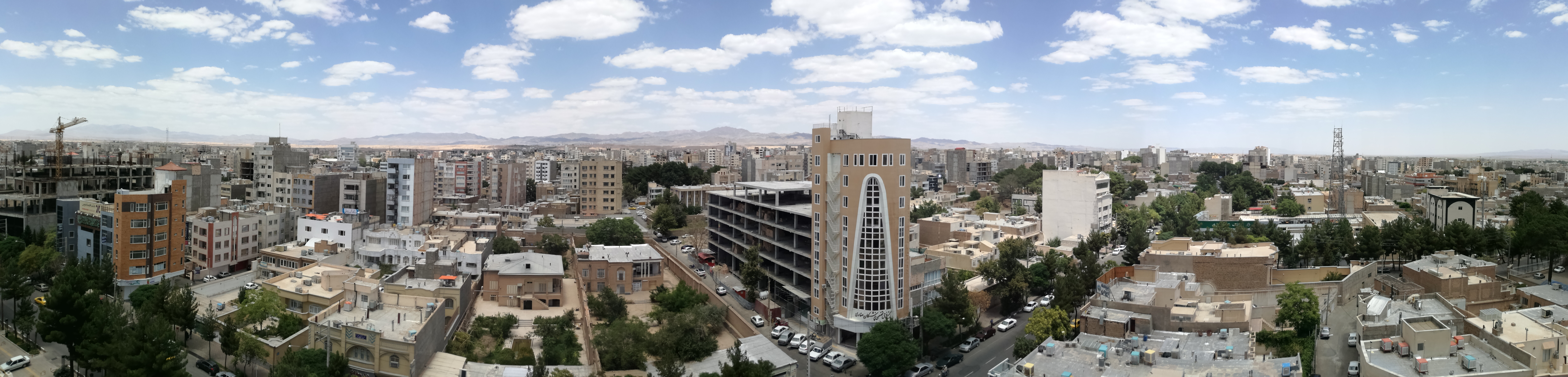 سراسرنمایی از مرکز شهر سبزوار